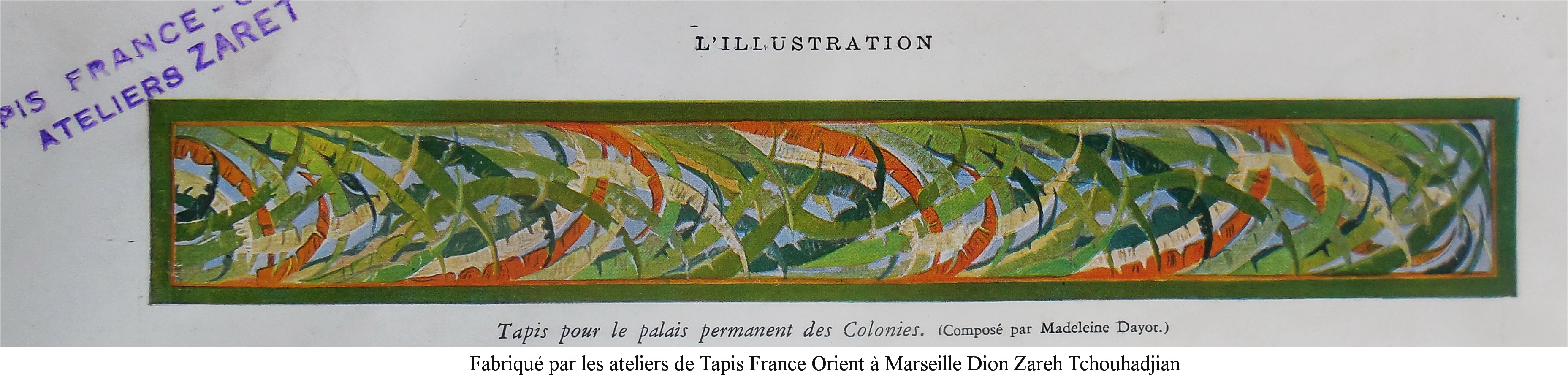 Le tapis fut composé par Madeleine Dayot et fabriqué par les Ateliers de Tapis France Orient à Marseille sous la direction de Zareh Tchouhadjian pour le Palais permanent des Colonies en 1931. Il est aujourd'hui exposé au musée du quai Branly - Jacques ChiracTapis Madeleine Dayot